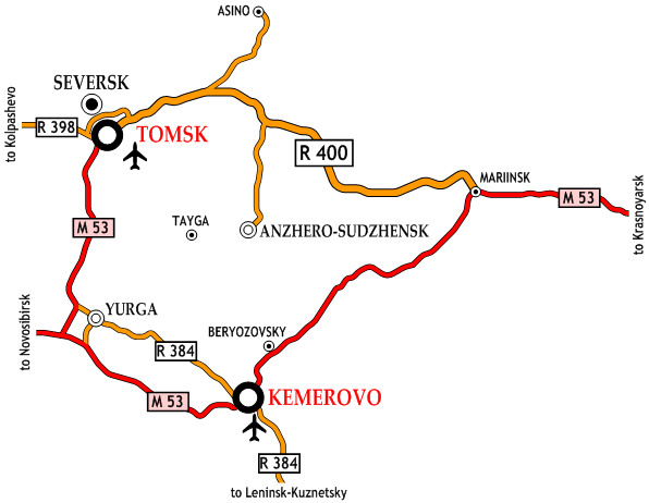 Map of R400 road, Tomsk—Mariinsk, EN